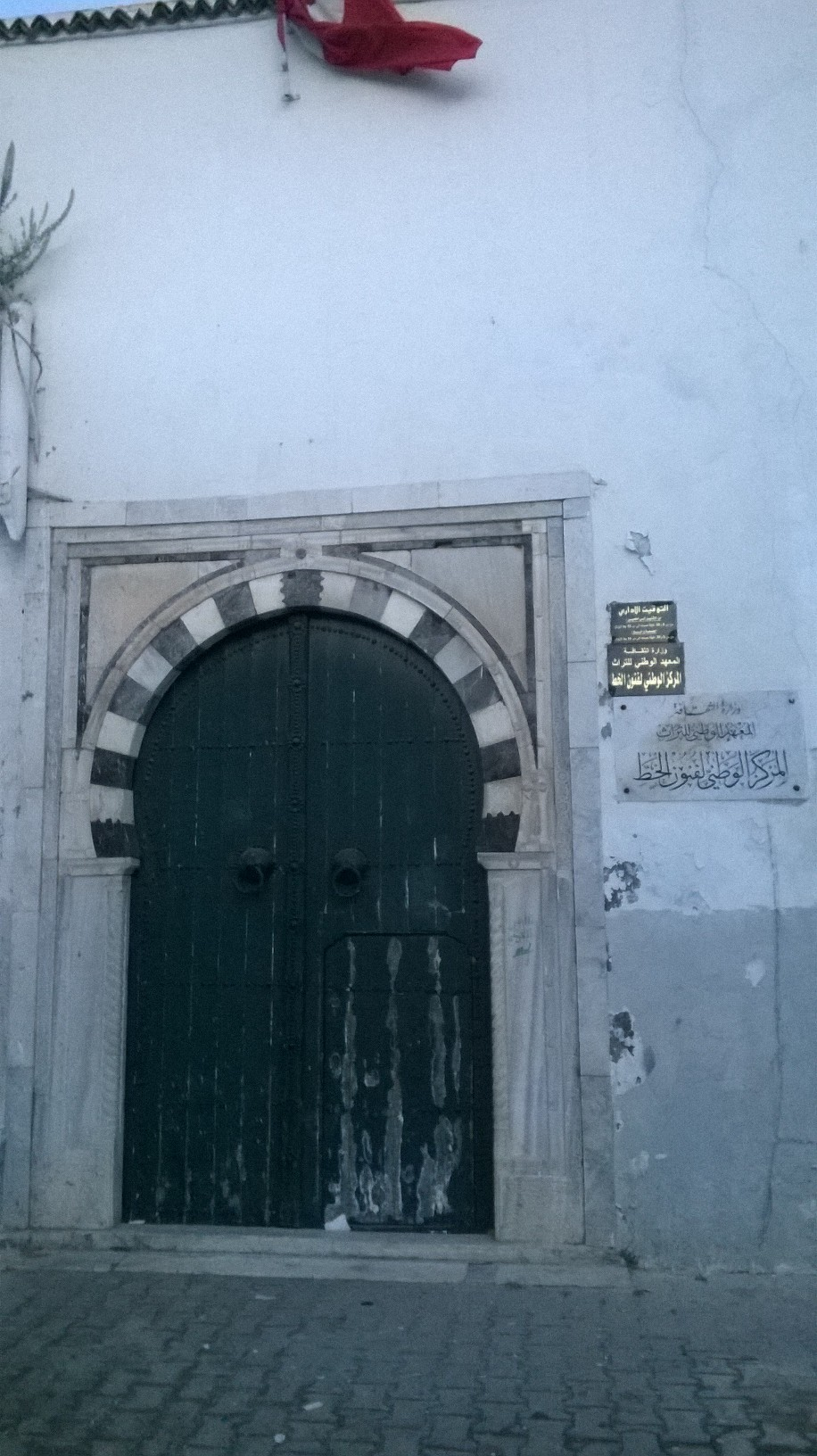 El Halfaouine, Bab Souika , Tunis الحلفاوين, باب سويقة ، تونس